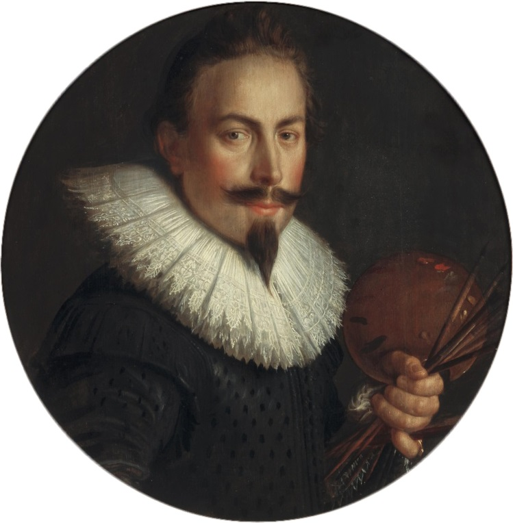 Portret van Peter Wtewael